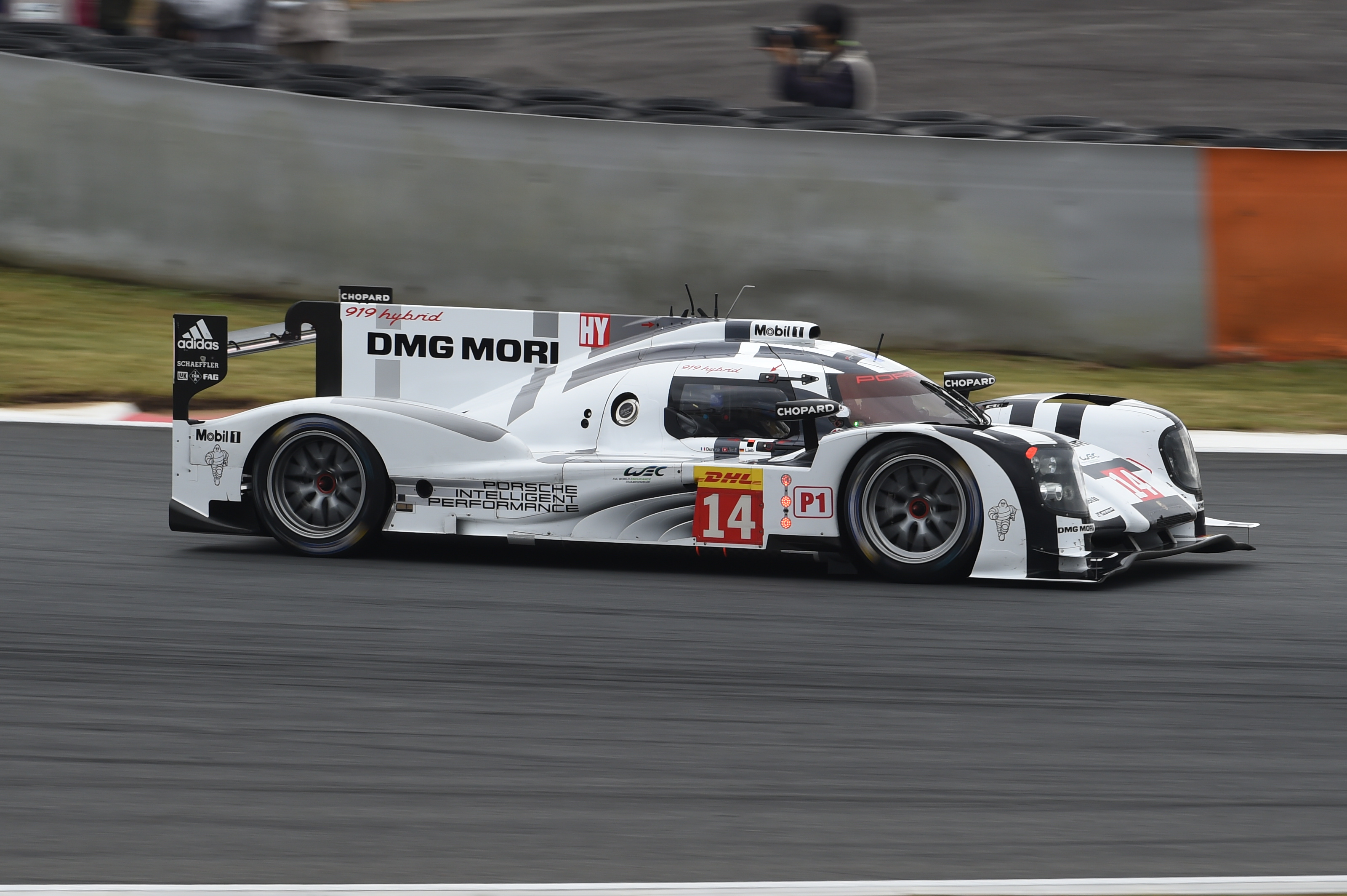 ポルシェ919ハイブリッド